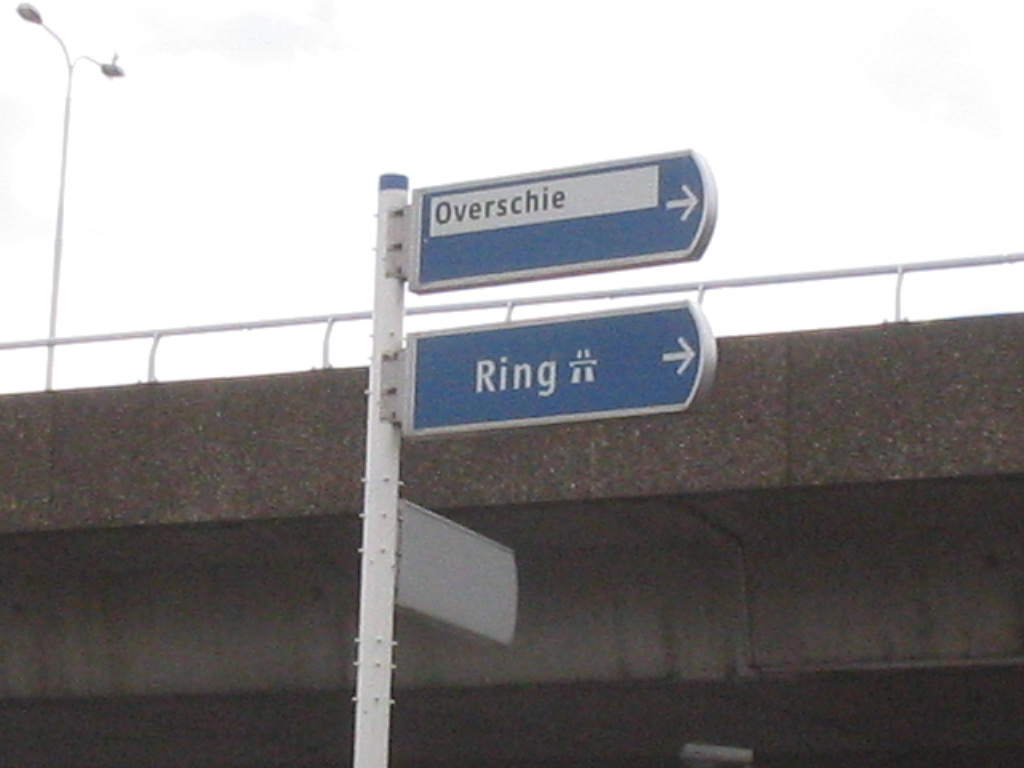 bord Ring Rotterdam bij Kleinpolderplein.